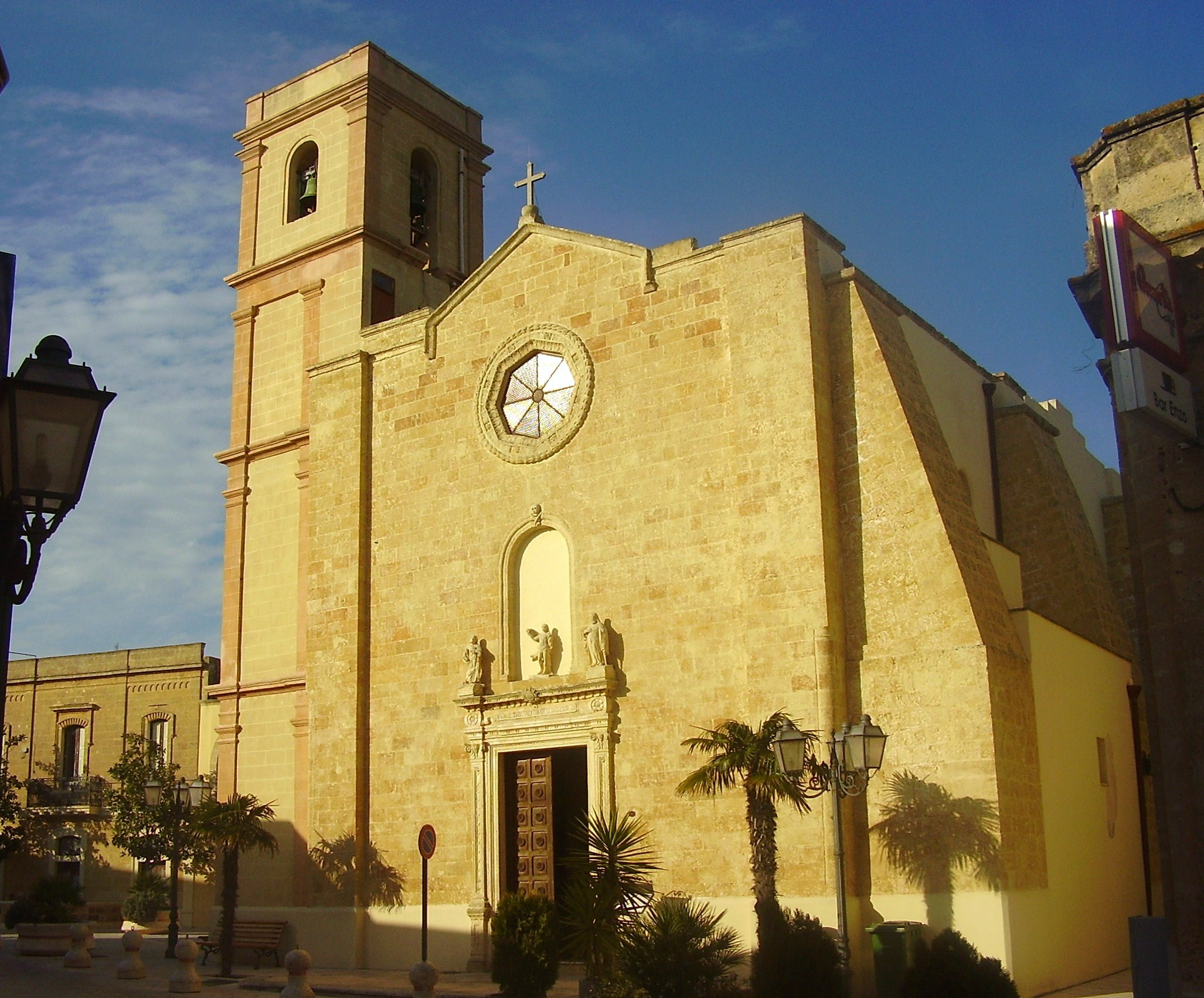 Chiesa Madre di Patù, Lecce